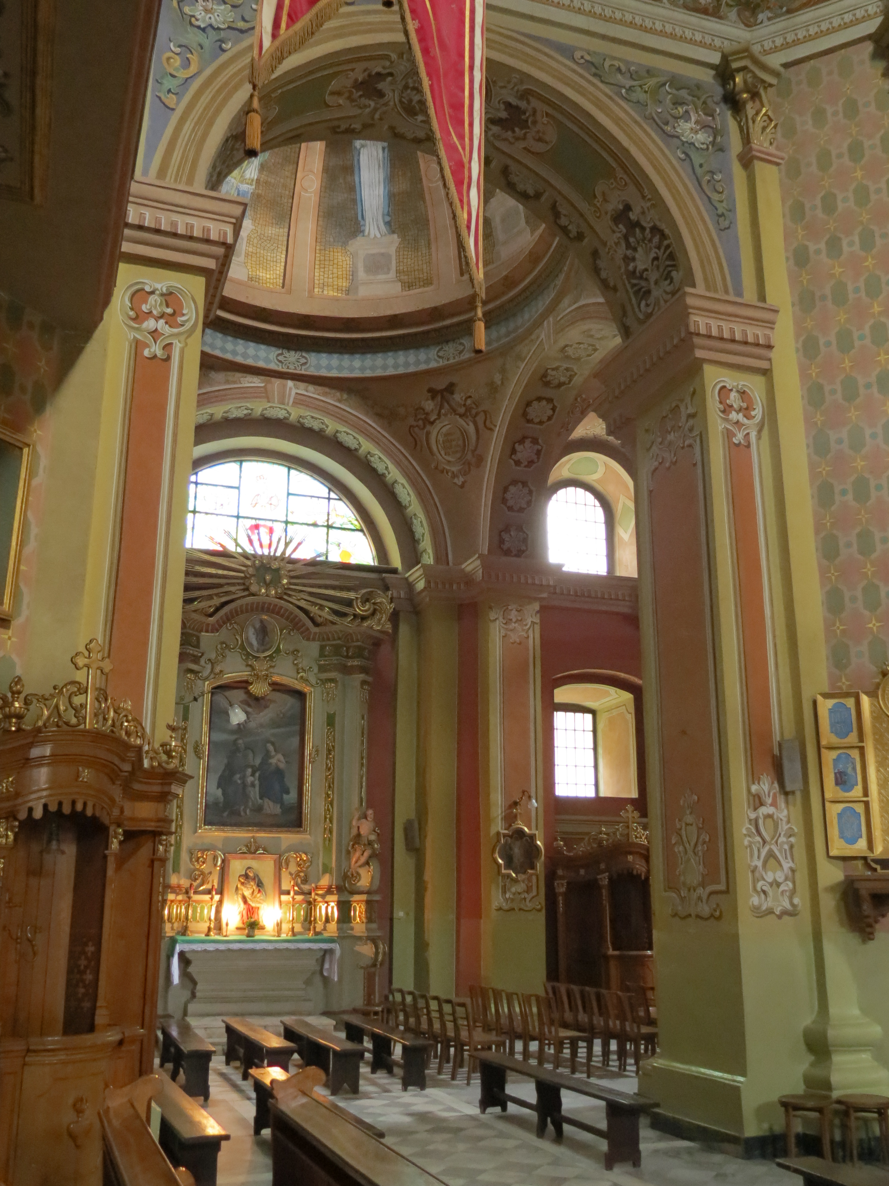 Jarosław, kościół p.w. św. Jana Chrzciciela, ob. par. p.w. Bożego Ciała, 1572, XVIII, 1890